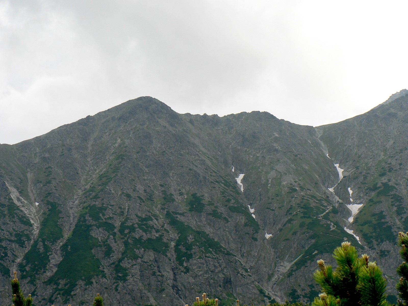 Rakuska Czuba i Rakuska Przełęcz znad Wielkiego Białego Stawu